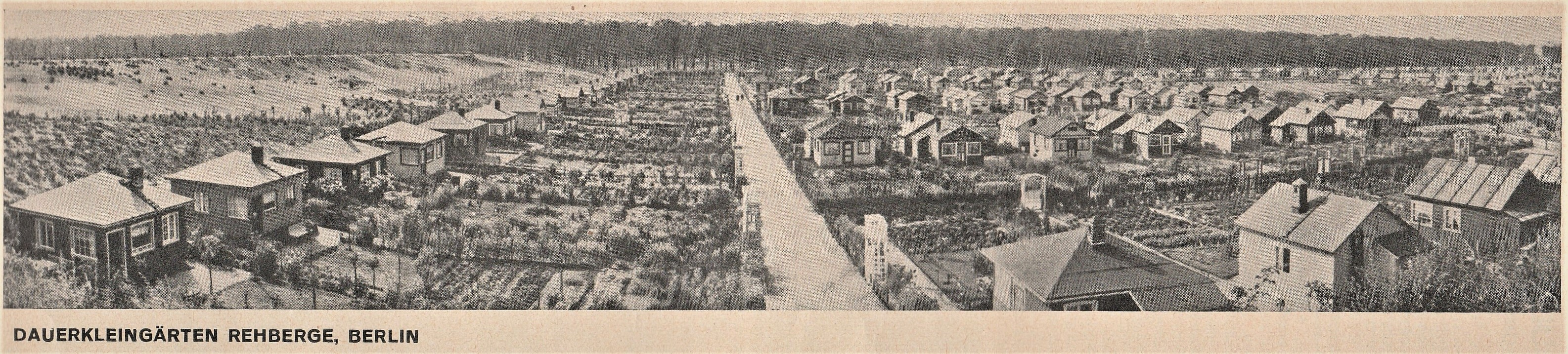 Ansicht der Dauerkleingartenkolonie Rehberge 1930